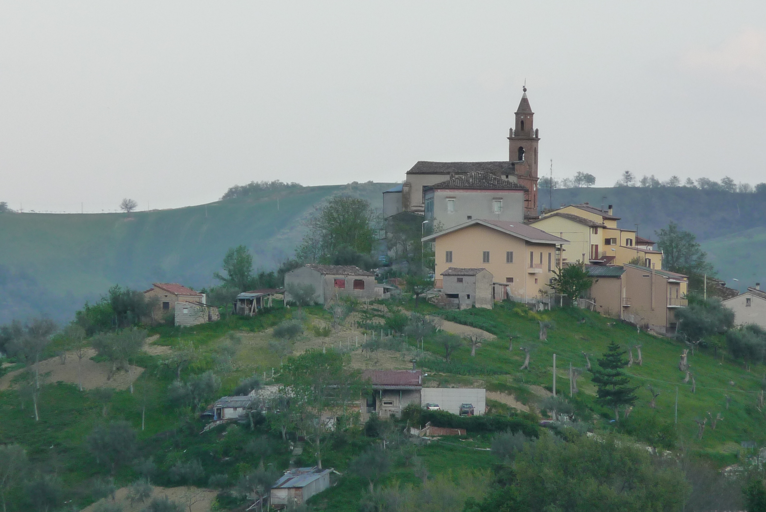 Collevecchio in Abruzzo. Foto da Lucio De Marcellis.